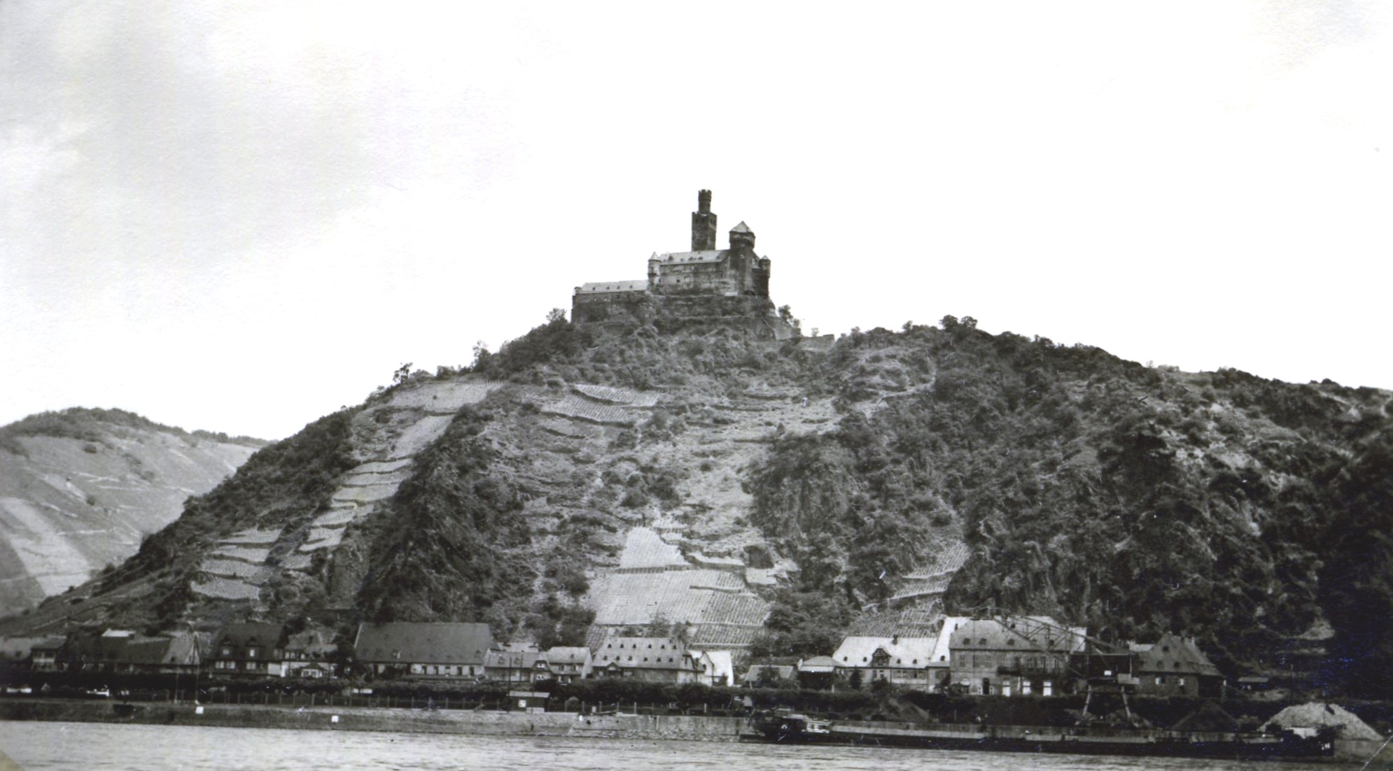 Blick auf die Marksburg im Juli 1938